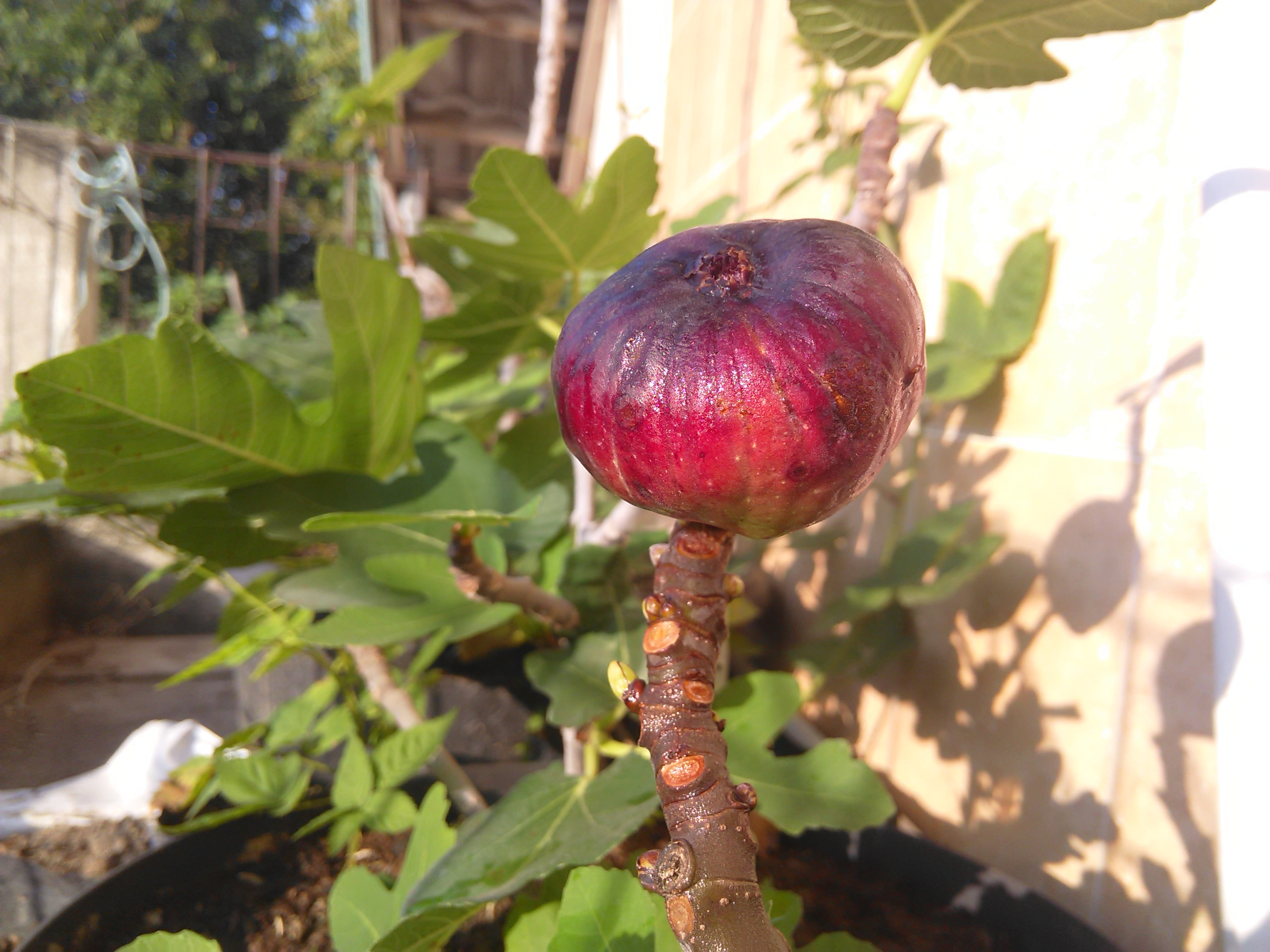 Foto buah tin yang sudah masak - Jenis Masui Dauphine dari Jepang